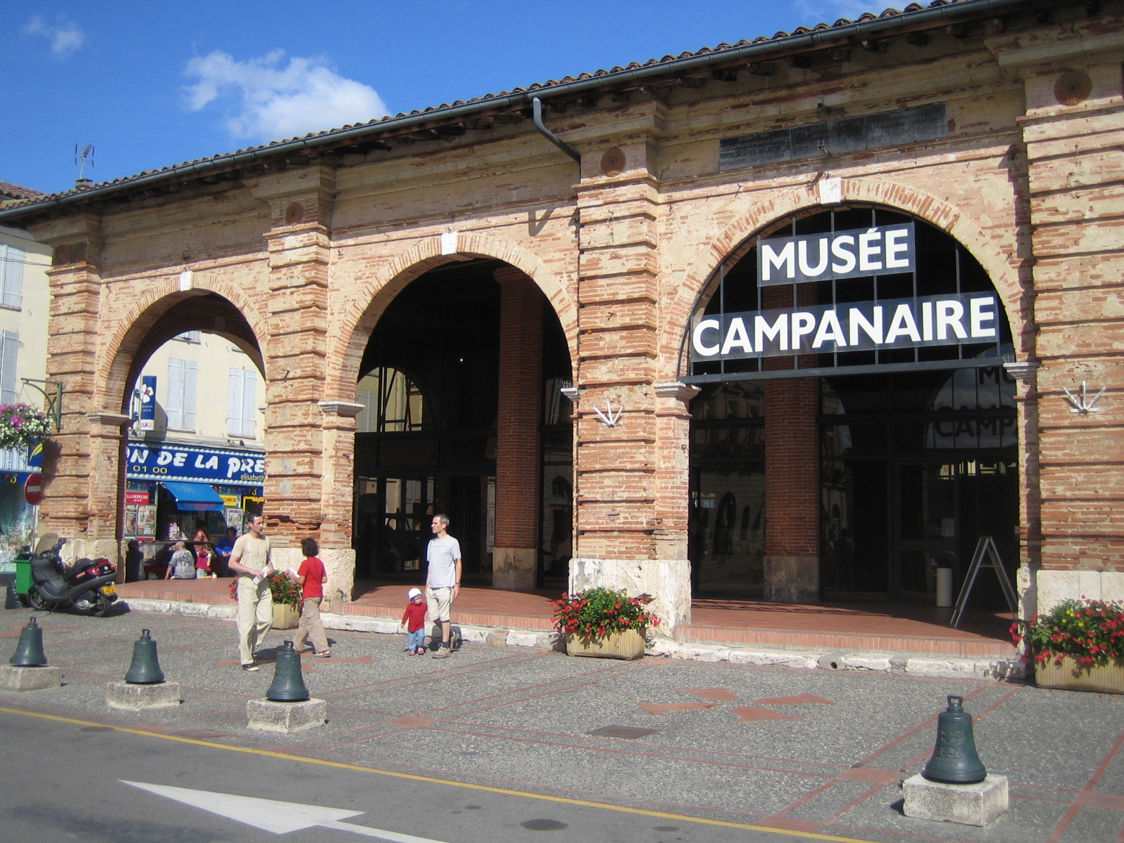 Halle de L'Isle-Jourdain (Gers, France).